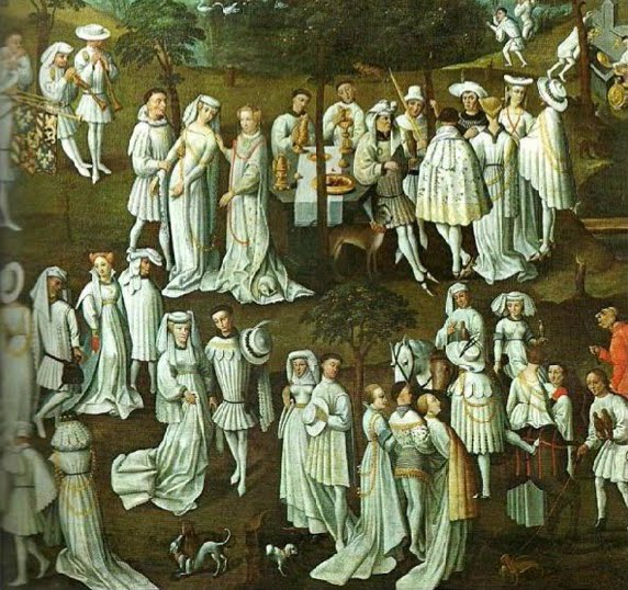 Détail. Dans les jardins du château de Hesdin en 1432 (Fêtes données à l'occasion du mariage de son chambellan André de Toulongeon) copie du 16e